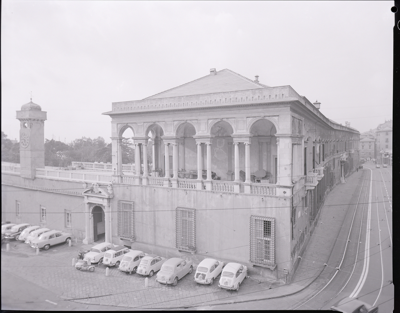 Servizio fotografico : Genova, 1963 / Paolo Monti. - Buste: 1, Fototipi: 1 : Negativo b/n, gelatina bromuro d'argento/ pellicola ; 10x12. - ((Serie costituita da 1 busta di negativo identificato con il n.: 7487. - Il negativo identificato con il numero 46397 è stato realizzato per Zodiac. - Occasione: Documentazione per la pubblicazione: Italia Nostra (a cura di), "Le ville genovesi", catalogo della mostra, Genova 1962, Genova, Comune di Genova, 1967. - Fonte: Monografia di Italia Nostra (a cura di): Le ville genovesi, catalogo della mostra, Genova 1962, Genova, Comune di Genova (1967). - Fonte: Lettera di Paolo Monti: I. Carteggi/ Genova - Enrico (1963-1966), presso Archivio Paolo Monti. Camicia con documenti dattiloscritti e manoscritti vari relativi al lavoro eseguito per Italia Nostra: preventivi, lettere, inventari. - Fonte: Rubrica di Paolo Monti: Archivio fino 1-4-1961/ 31-3-1963 (1961-1963), presso Archivio Paolo Monti. - Fonte: Agenda di Paolo Monti: R 1 - Monti/ 1 aprile 1963 - 6 giugno 1964/ 6000-8193 (1963-1964), presso Archivio Paolo Monti